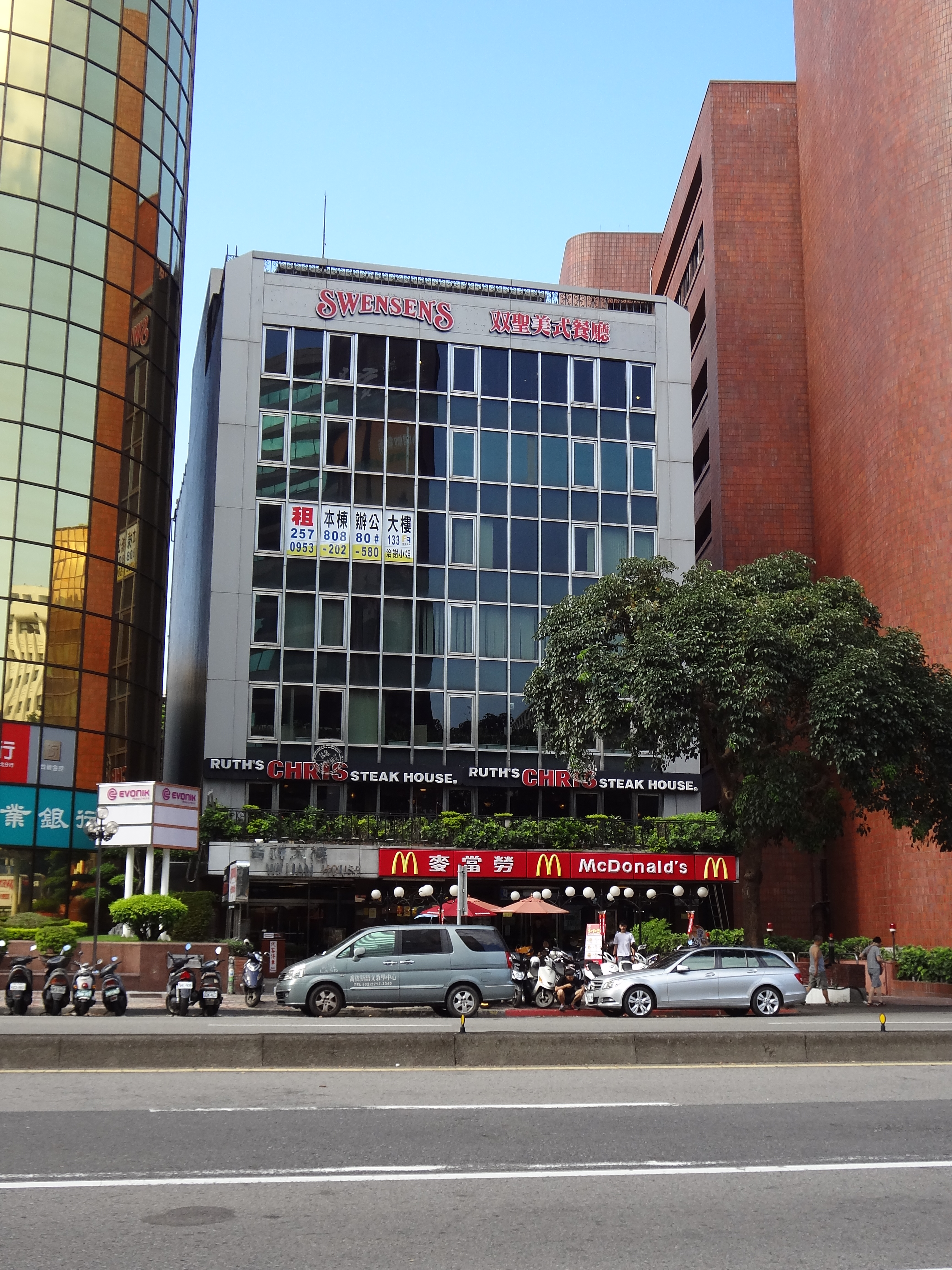 吉祥大樓位於臺北市松山區民生東路三段135號，1樓是台灣麥當勞第一家餐廳「台北民生店」。